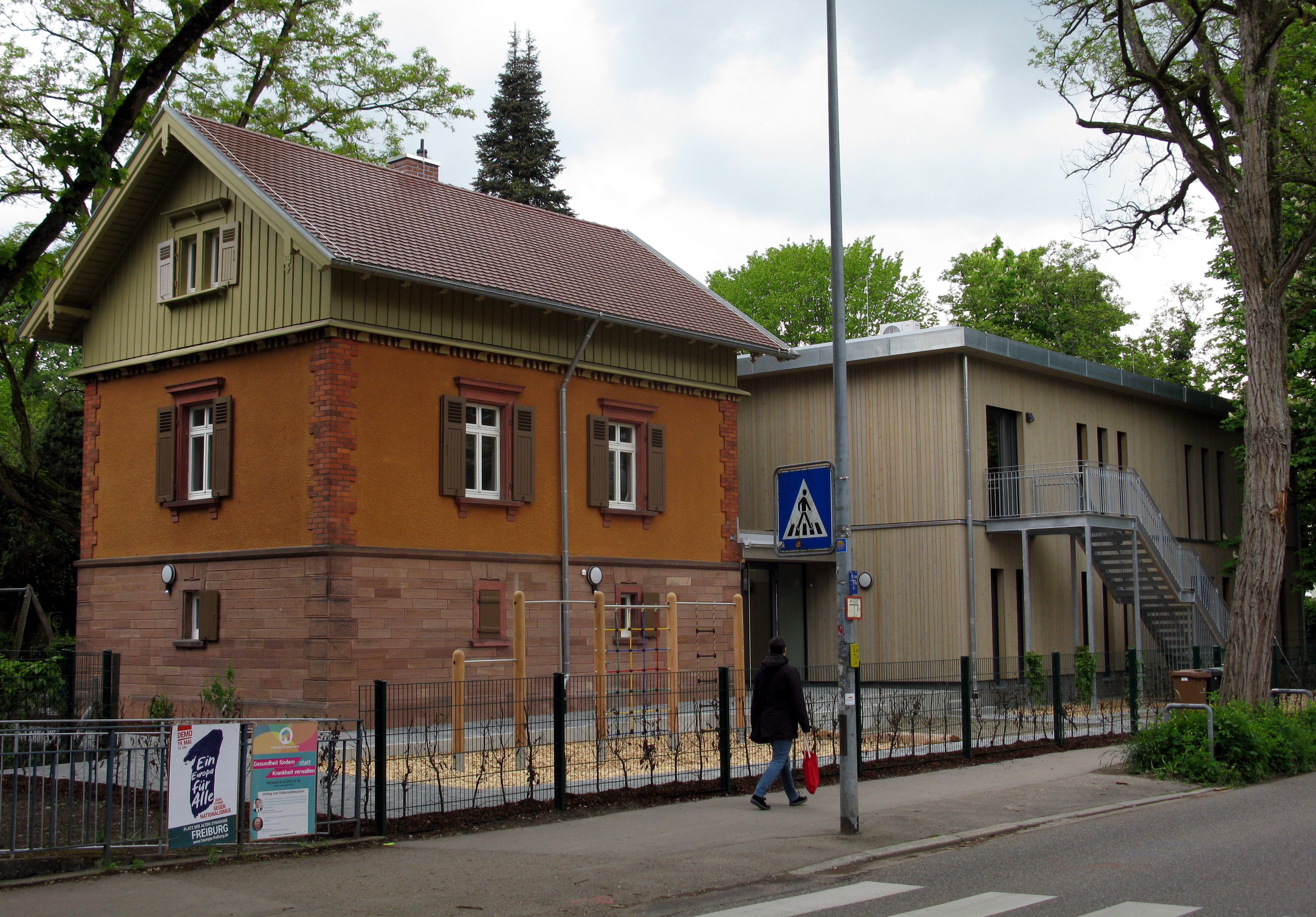 Früheres Bahnwärterhaus an der alten Höllentalbahnstrecke in der Freiburger Lorettostraße, dient seit 2019 mit Anbau als Kindertagesstätte